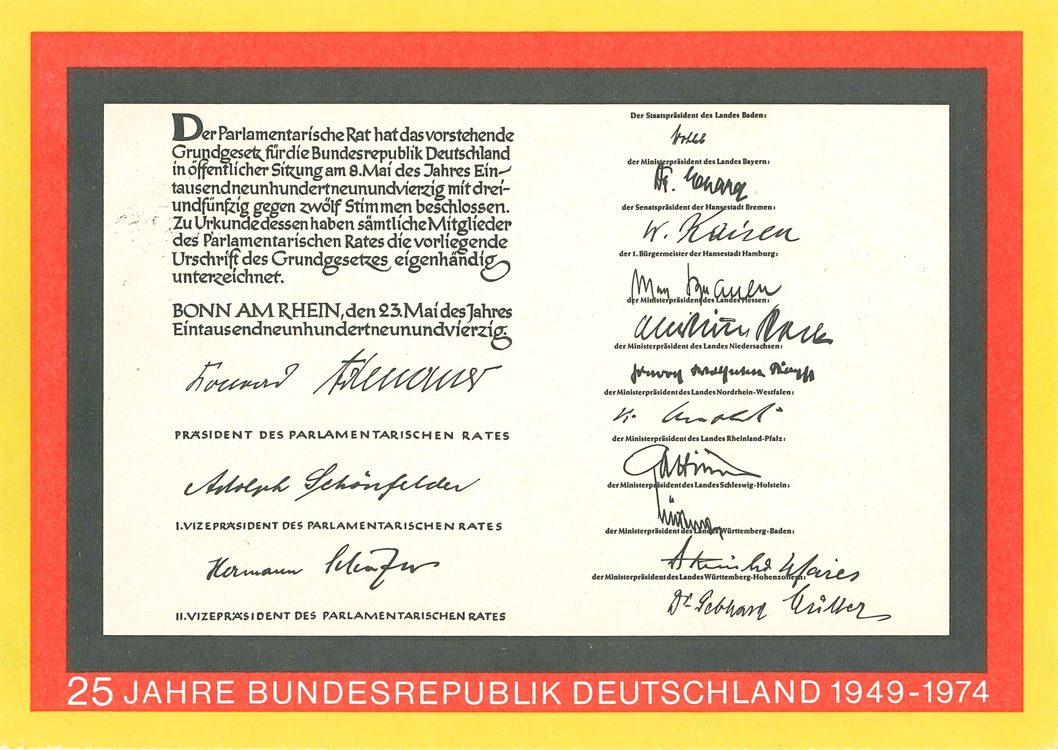 Wiedergabe der Unterschriftsblätter zum GG auf einer Postkarte der Bundespost anläßlich des 25jährigen Jubiläums; öffentlich, keine Schöpfungshöhe.